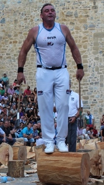 Joxemari Olasagasti 2013ko Donostiako Urrezko Kopan. 2013-08-15, Trinitate plaza, Donostia.